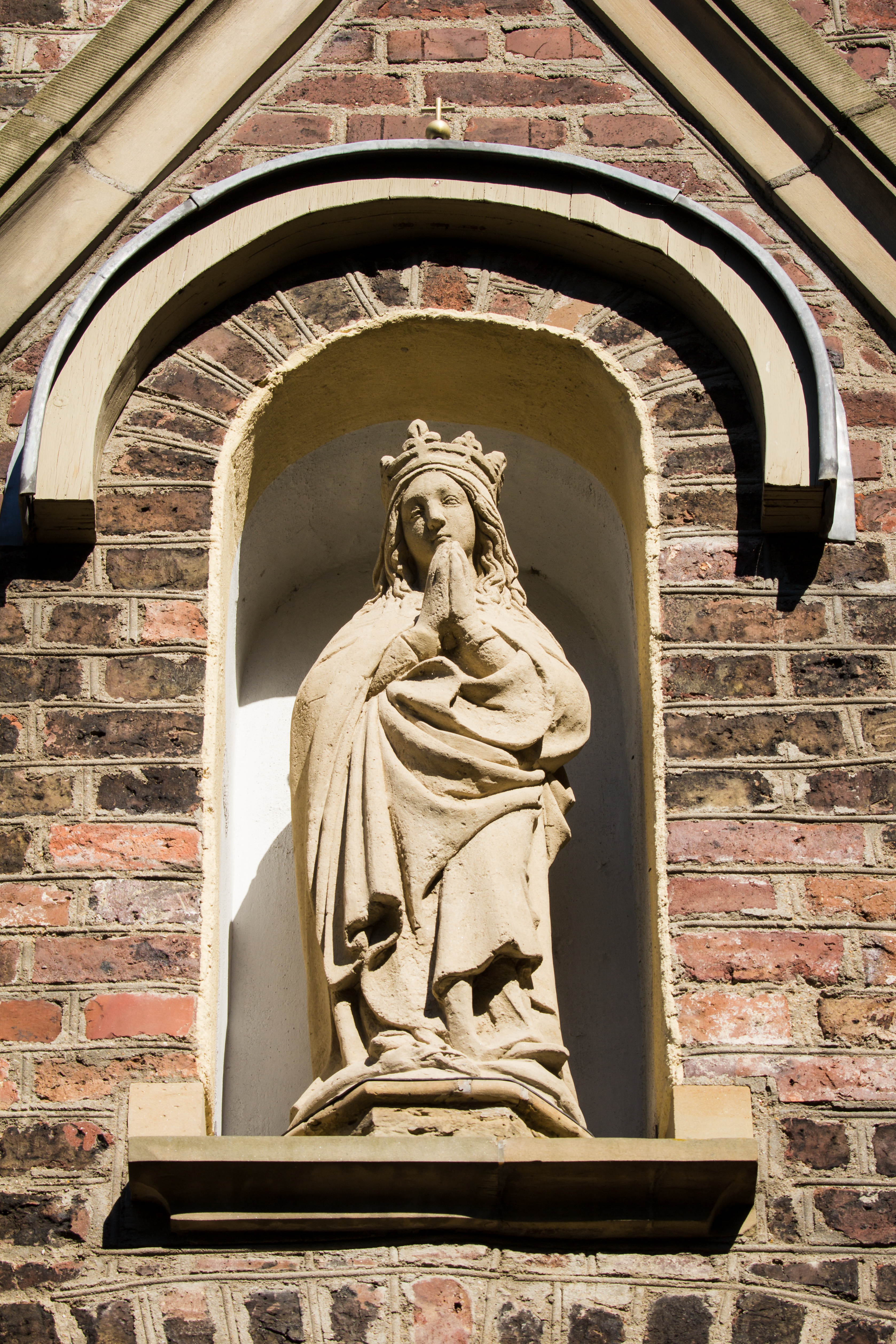 Katholische Pfarrkirche St. Servatius in Köln-Immendorf